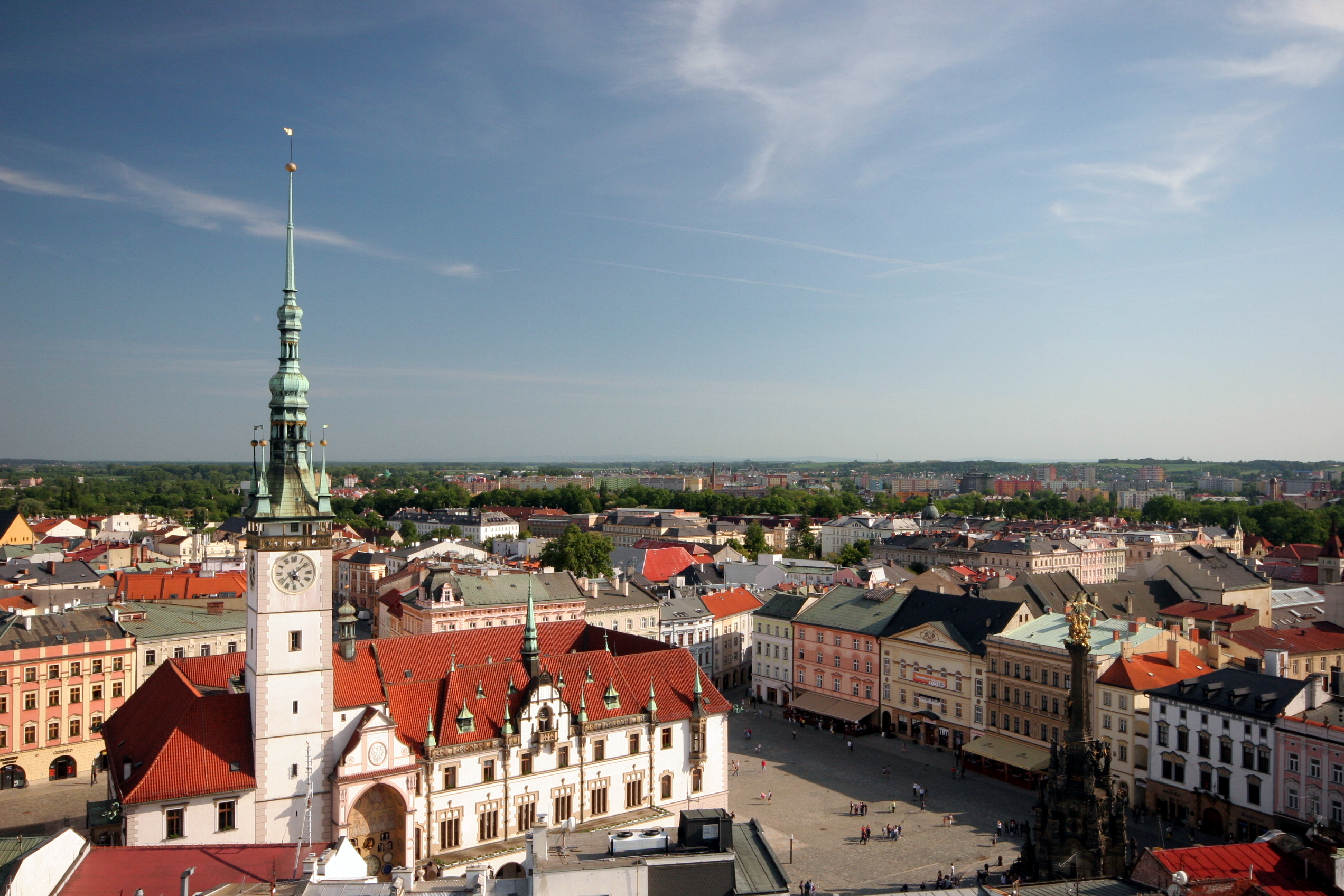 Vista de Olomouc da Torre da Catedral de São Moritz